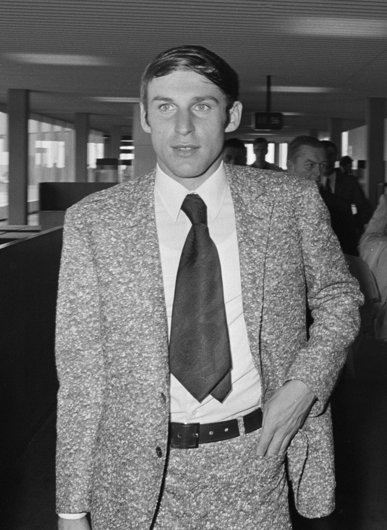 Dragan Džajić speelt met het Joegoslavische elftal tegen Nederland.